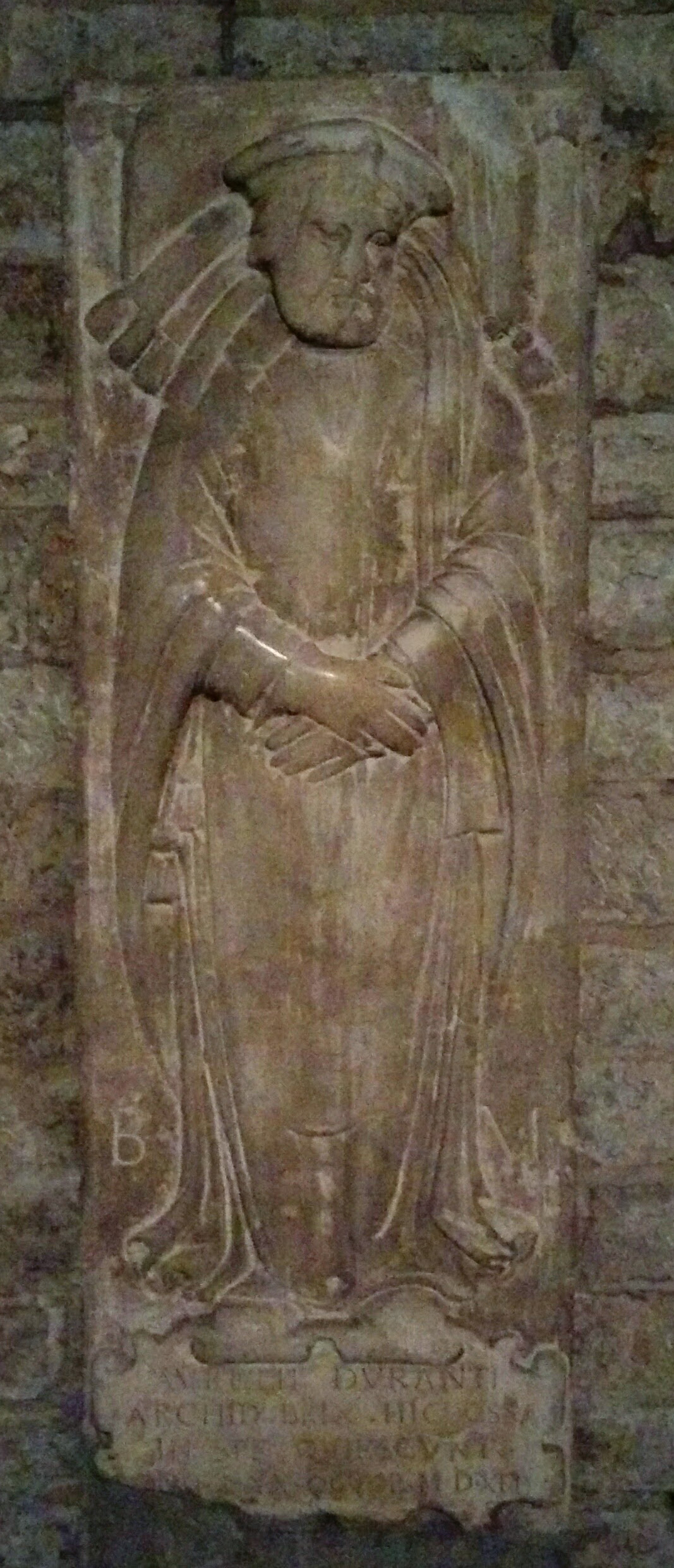 Lastra tombale di Aurelio Duranti, arcidiacono del Capitolo della Cattedrale, Duomo Vecchio di Brescia